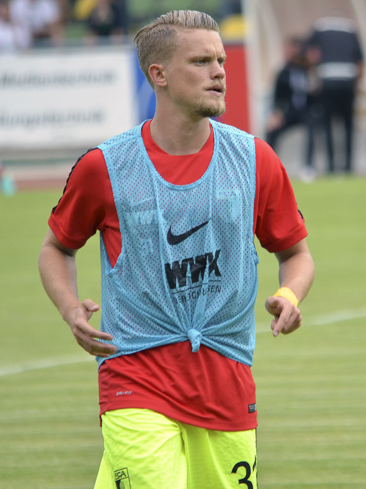 Philipp Max vom FC Augsburg (2016)